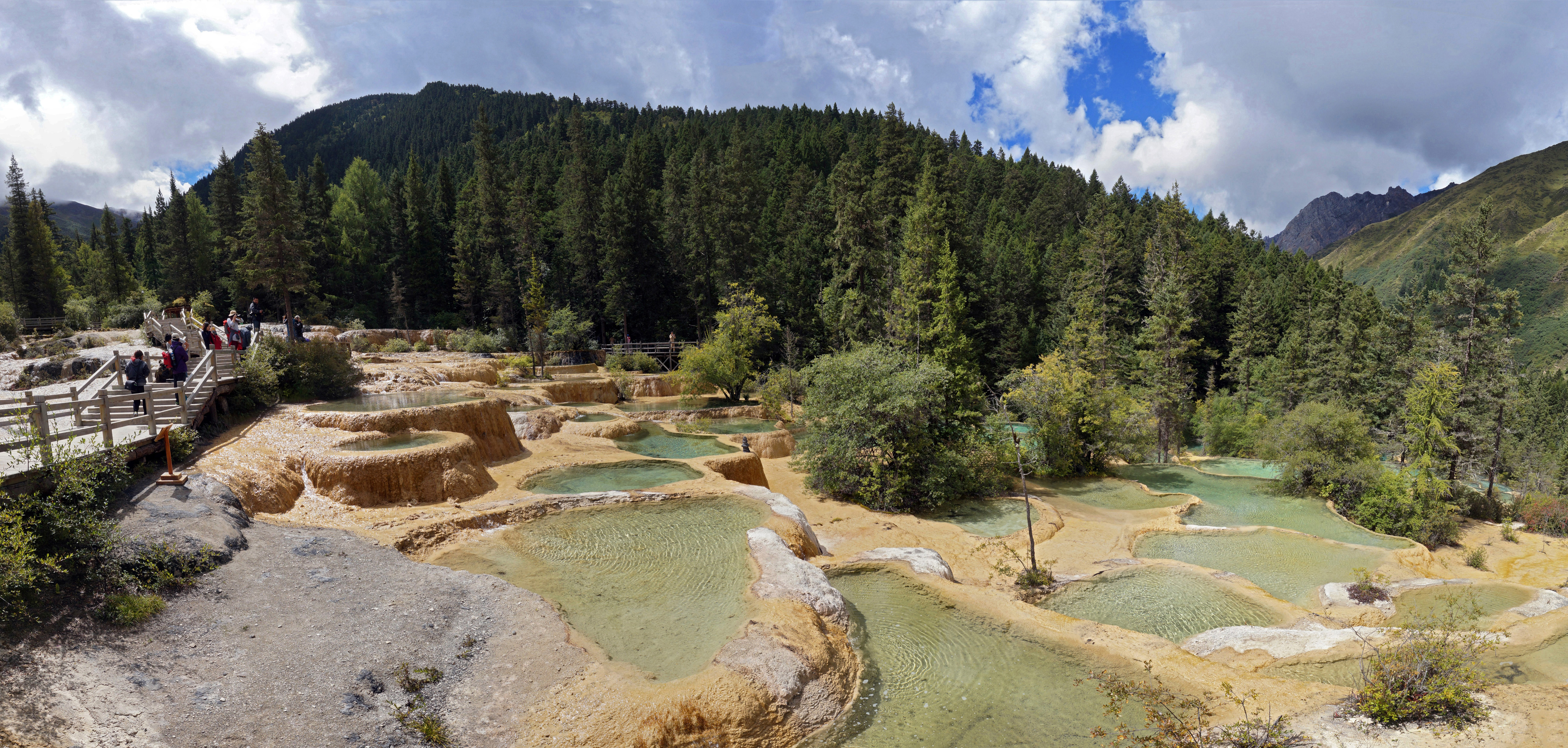 黃龍-迎賓池